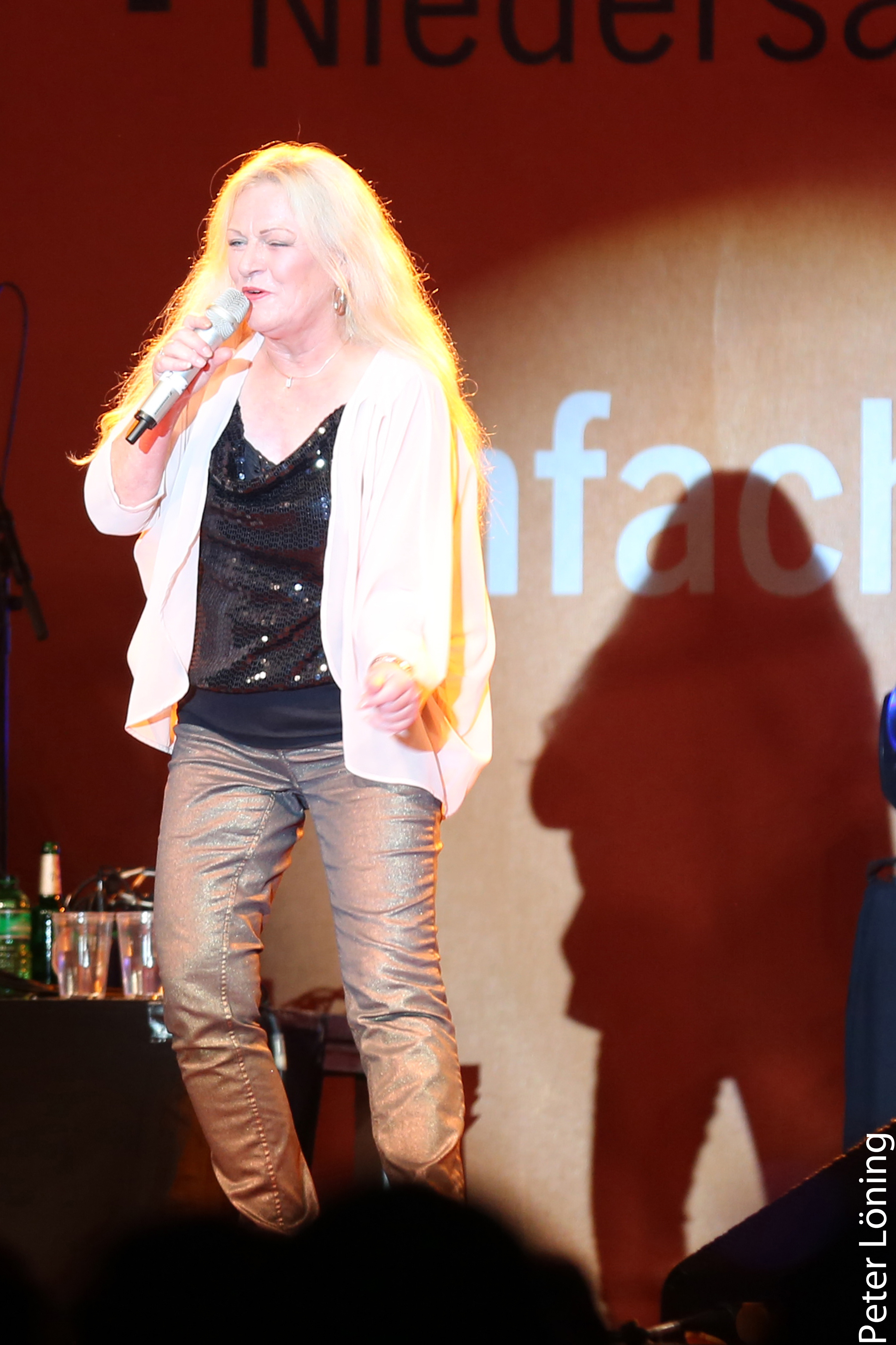 Toni Wille live in den Emslandhallen Lingen - NDR1 Oldie-Show 2013